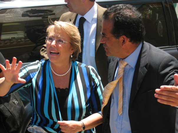 Presidenta de Chile Michelle Bachelet inaugurando el centro cultural Agustín Ross junto a alcalde de Pichilemu Roberto Córdova.